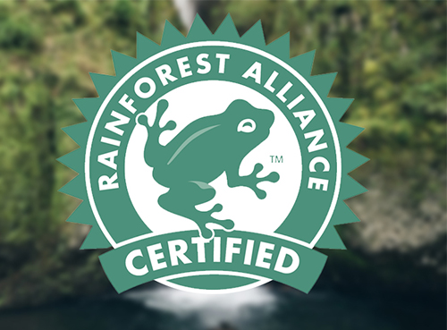 Rainforrest Alliance Cert